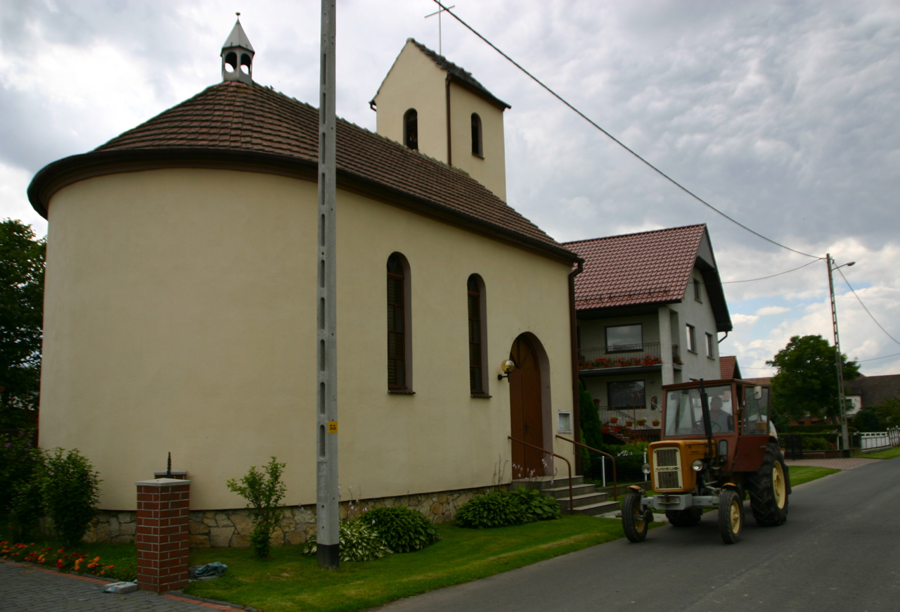 Otoki (dodatkowa nazwa w j. niem. Ottok) – wieś w Polsce położona w województwie opolskim, w powiecie prudnickim, w gminie Biała.